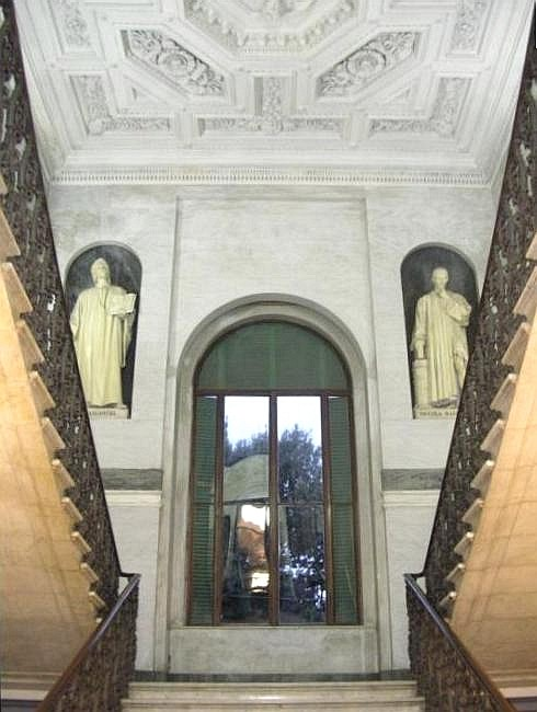 Livorno: interno del Palazzo de Larderel (XIX secolo). Lo scalone d'onore, progettato da Giuseppe Poggi.